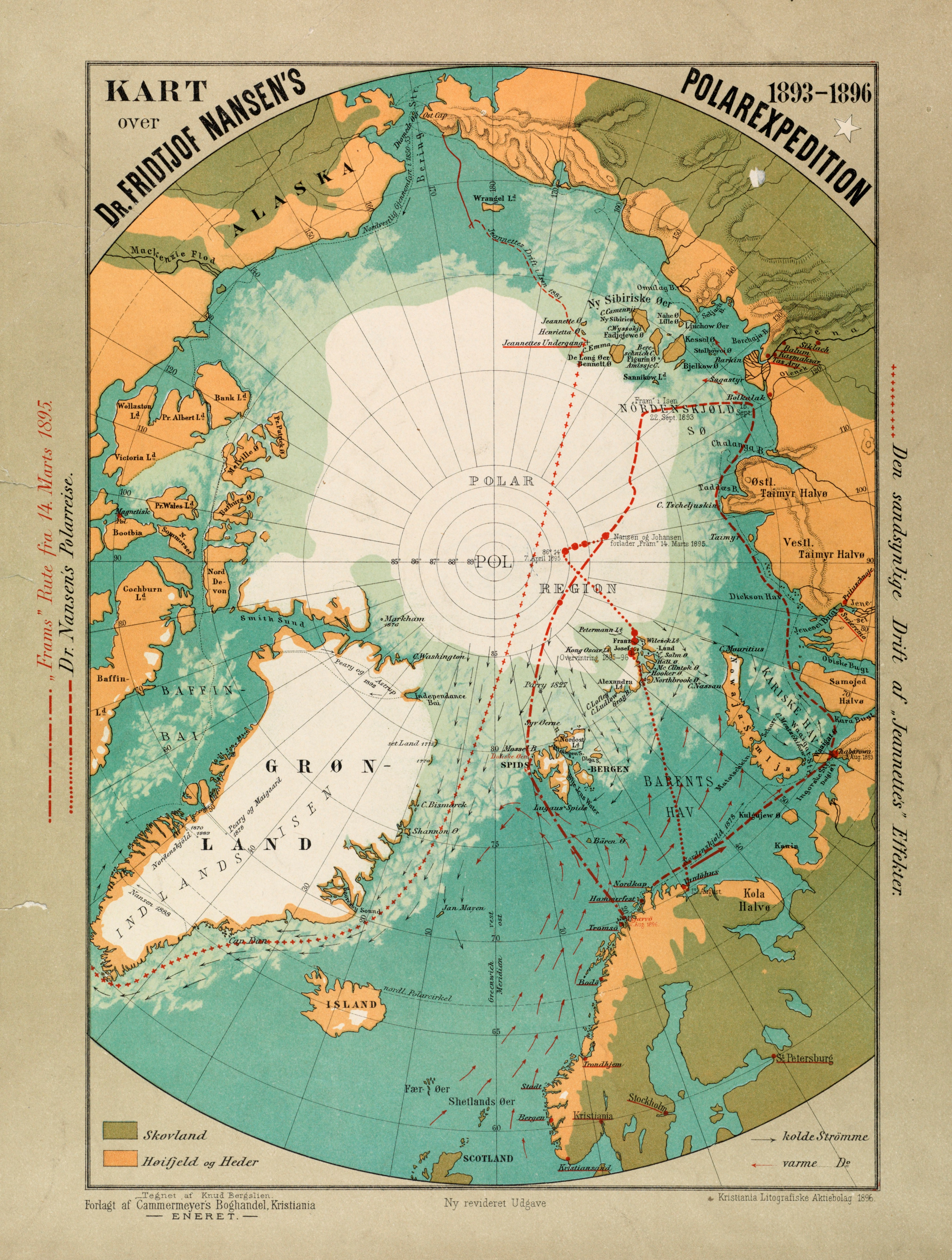 Kart fra Nasjonalbibliotekets kartsamling. Kartet er gitt ut i Kristiania (1896) og viser Nordområdene.